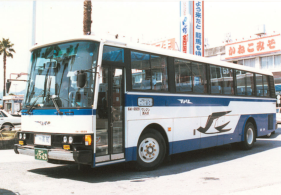 国鉄四国 なんごく号（特急便） いすゞP-LV219Q 富士重車体